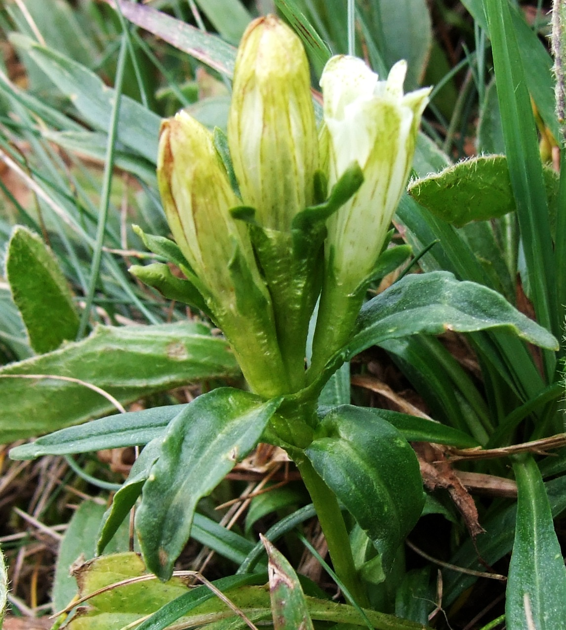 Gentiana frigida (pl. goryczka przezroczysta), habitat:West Tatra Mountains, Banikov